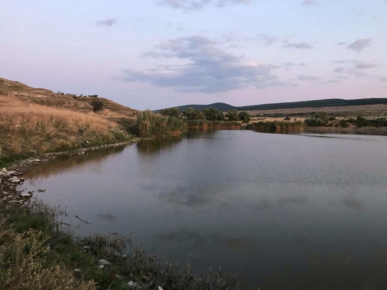 Пруд в Мурзакойской балке у села Кривцово, Крым